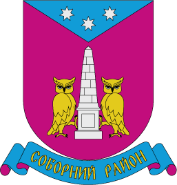 Герб Соборного району м. Дніпро